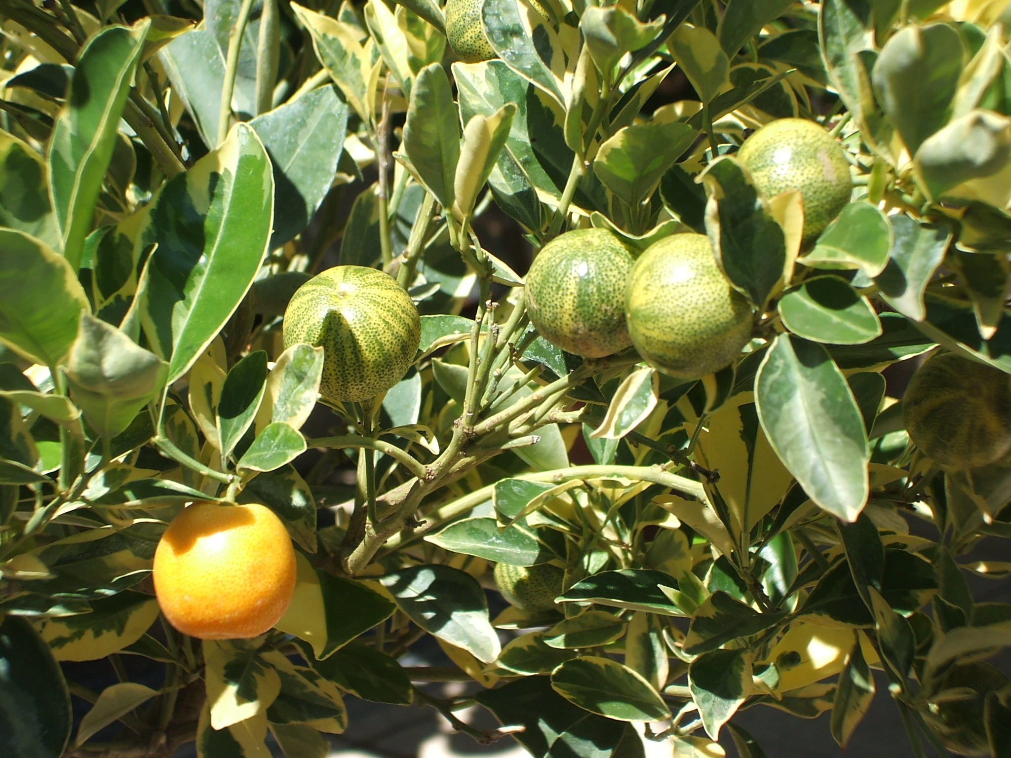 Citrofortunella Variegata